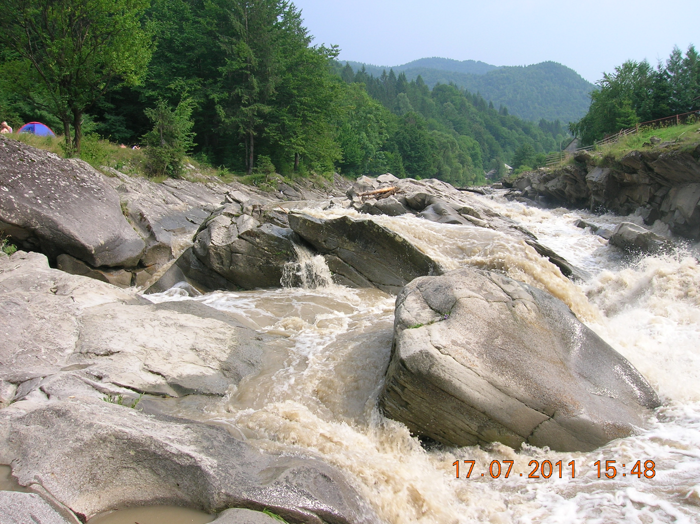 Munţii Tarcăului (Carpaţii Orientali, România)-Repezişurile Ianuş